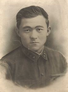 Нурбаев Мамат Нурбаевич г.Фрунзе 1935г.